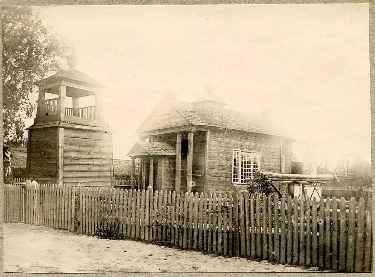 Царква ў вёсцы Азярычына ў пачатку XX ст.Беларуская (тарашкевіца): Азярчына (Aziaryčyna). Казьмадзям’янаўская царква-капліца